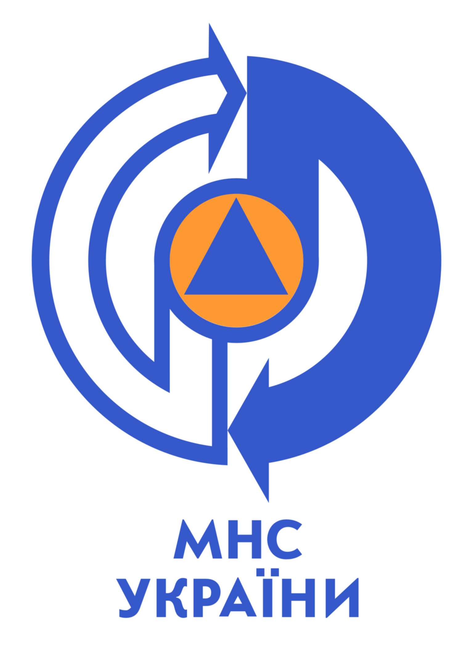 Фірмовий блок МНС України